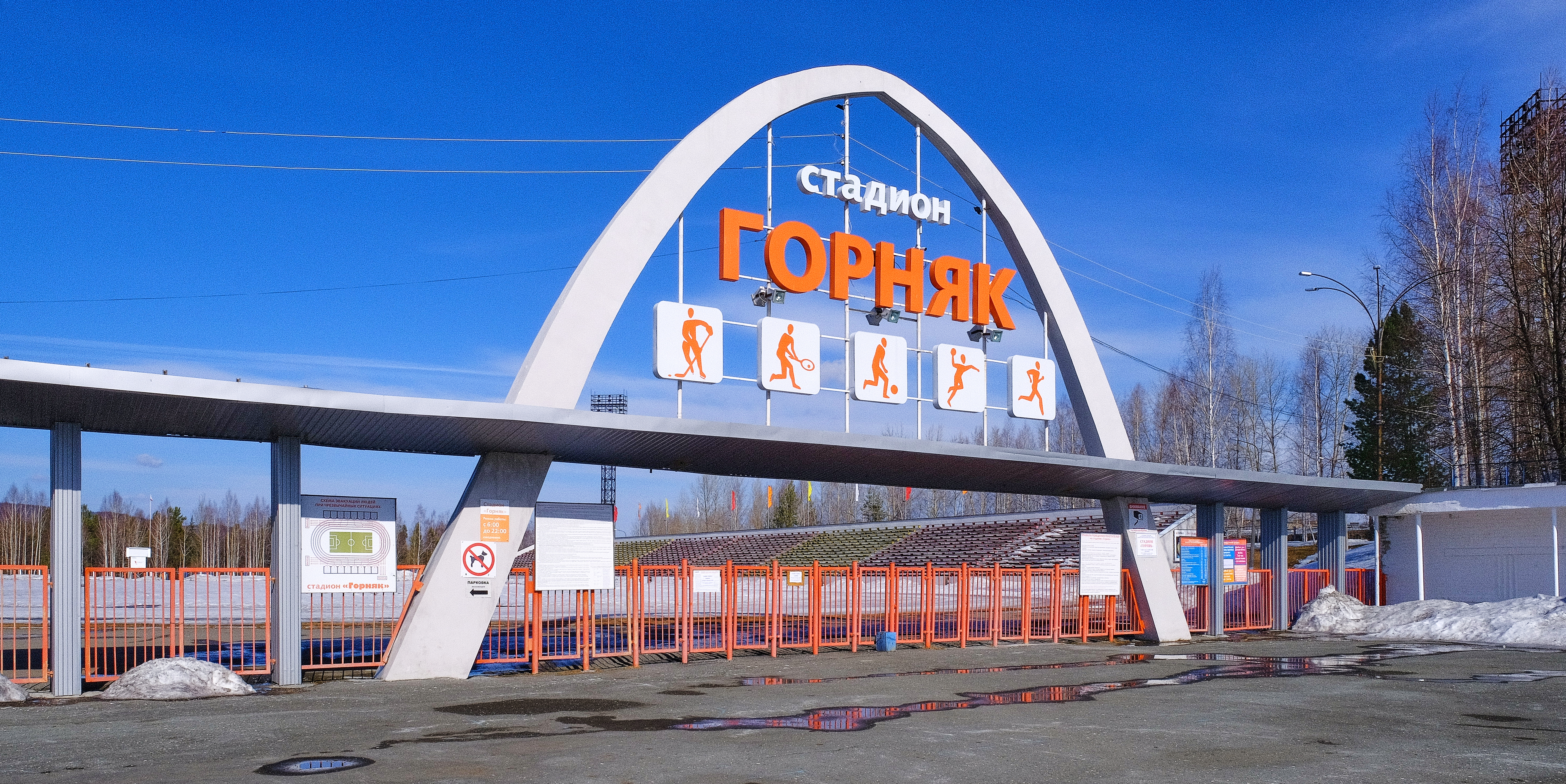 Стадион "Горняк" в Качканаре